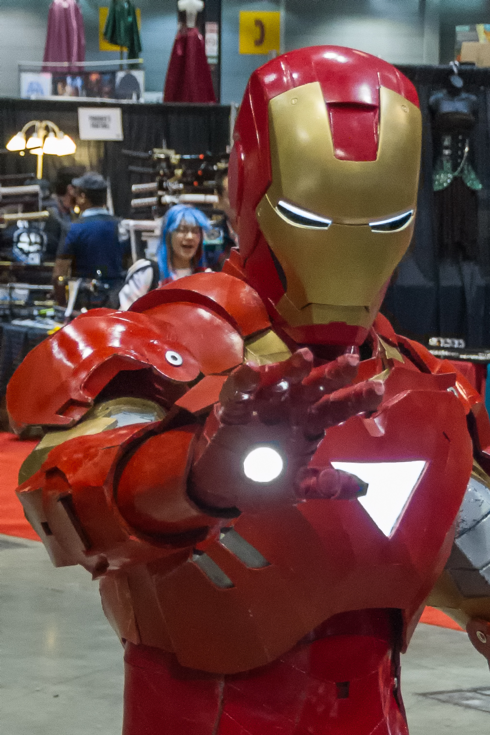 c2e2